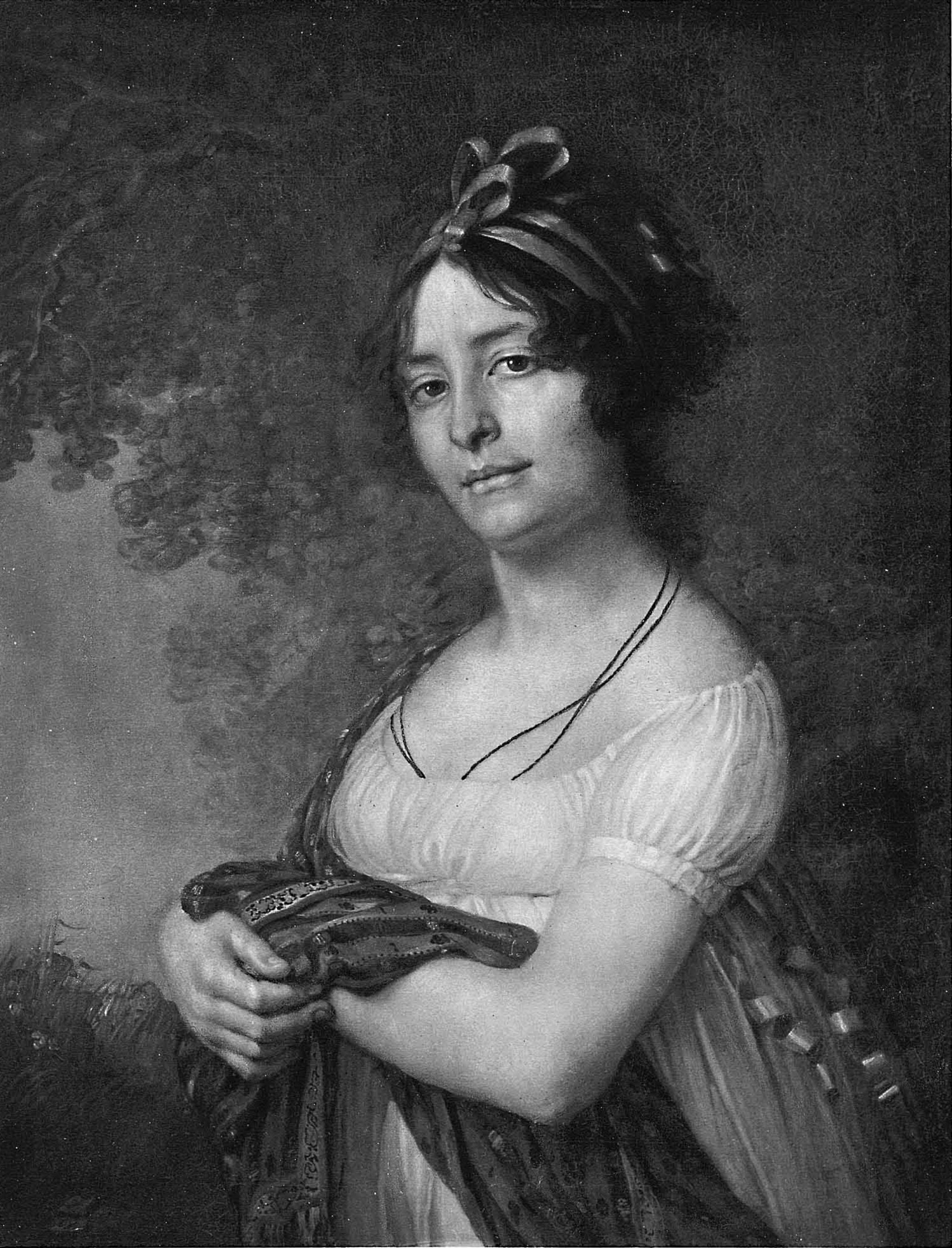 Прасковья Ивановна Лопухина, ур.Левшина (175.-178.), первая жена св. князя П.В.Лопухина, в браке имела трёх дочерей, одна из них известная фаворитка Павла I - Анна Петровна Гагарина, ур.Лопухина.